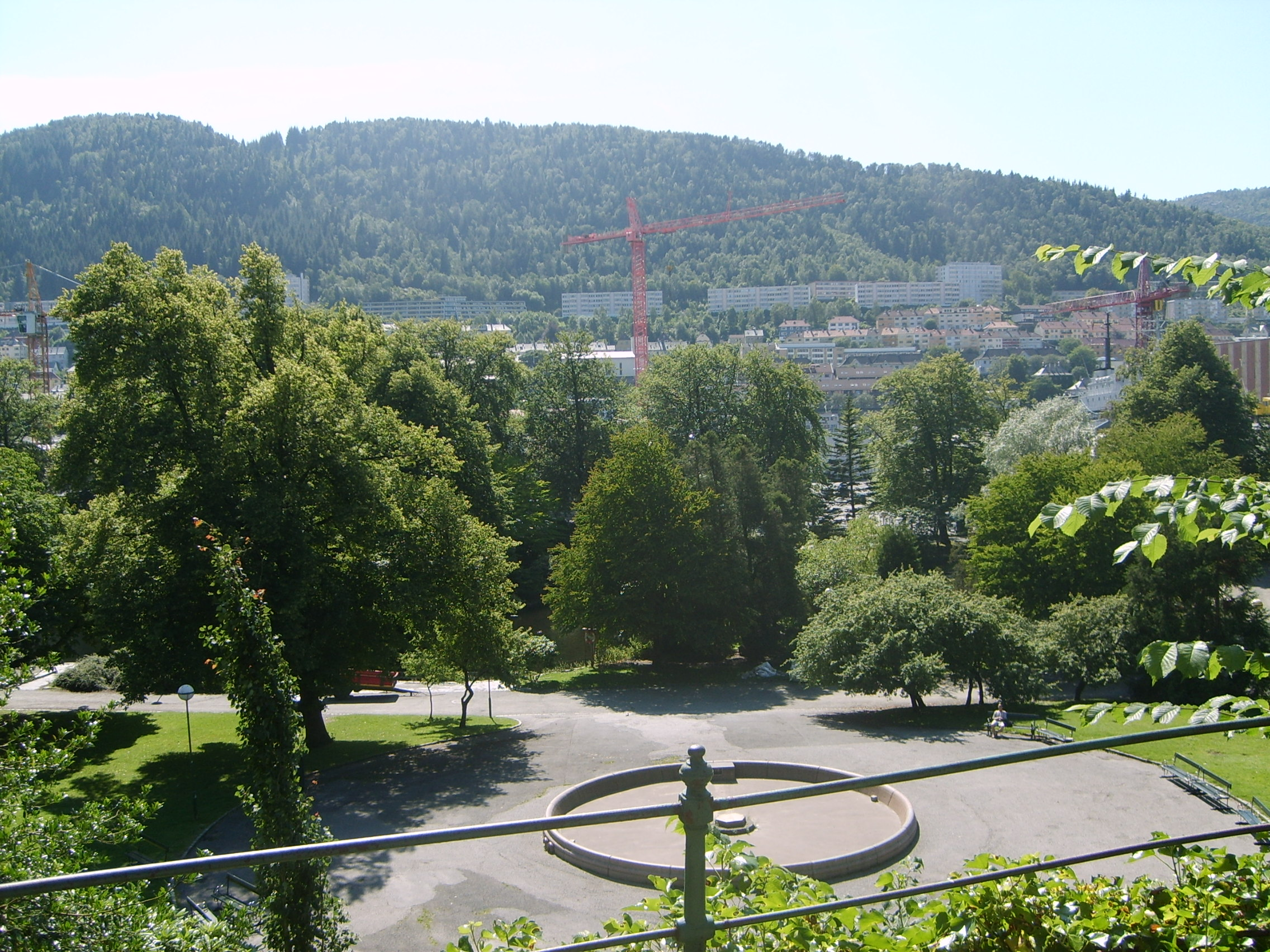 Bilde tatt 26. juli 2006 av Martin253